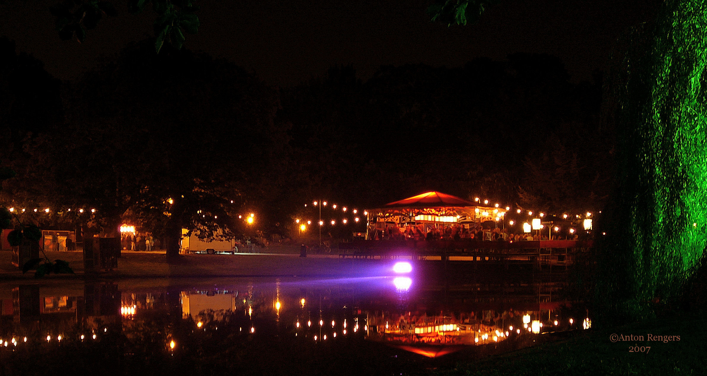 Noorderzon bij nacht. Noorderzon is een jaarlijks terugkerende 11-daagse internationale kunstenmanifestatie in het Noorderplantsoen en op diverse nabijgelegen locaties in en om het centrum van Groningen.